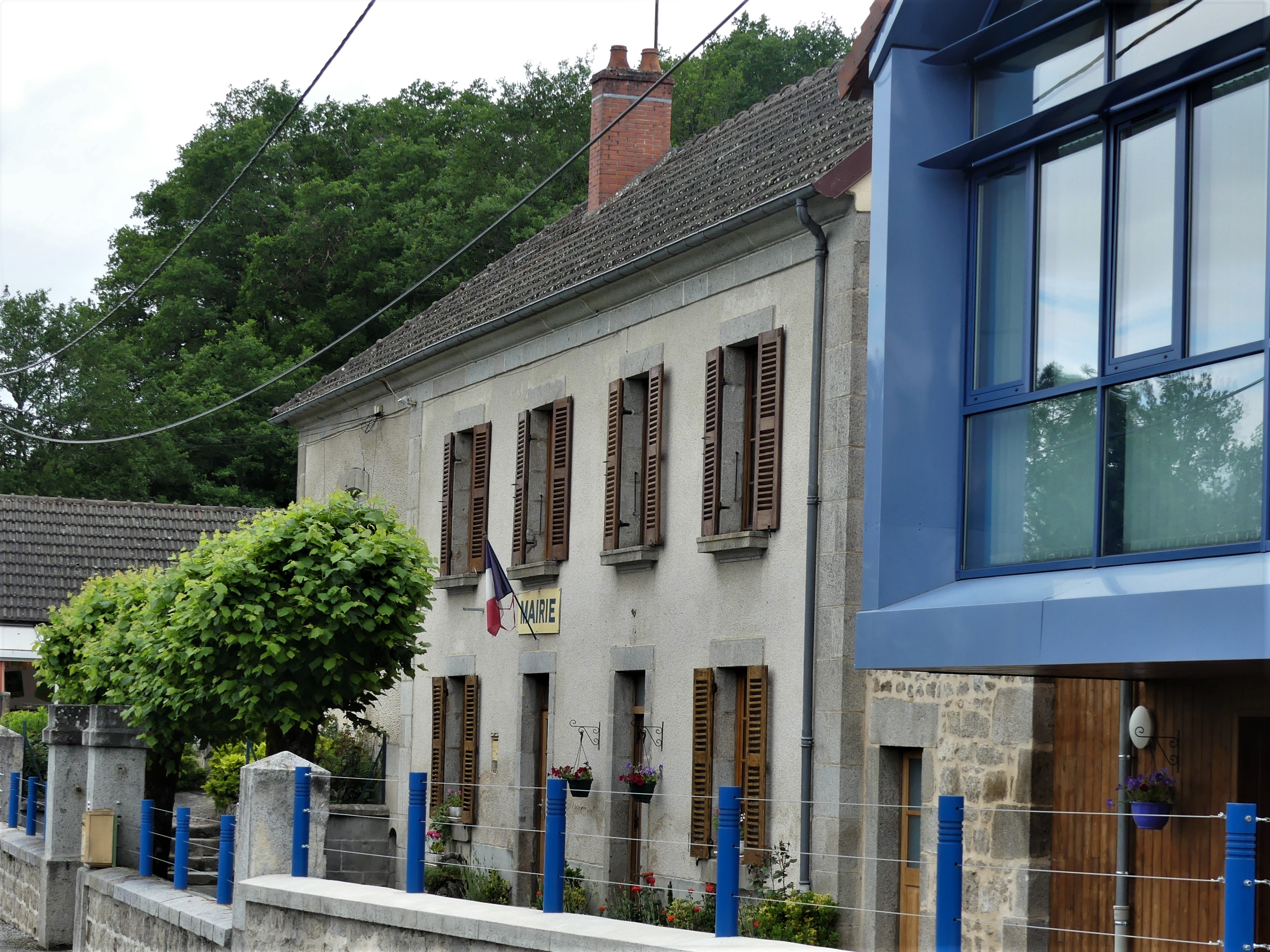 La mairie de Saint-Amand, Creuse, France